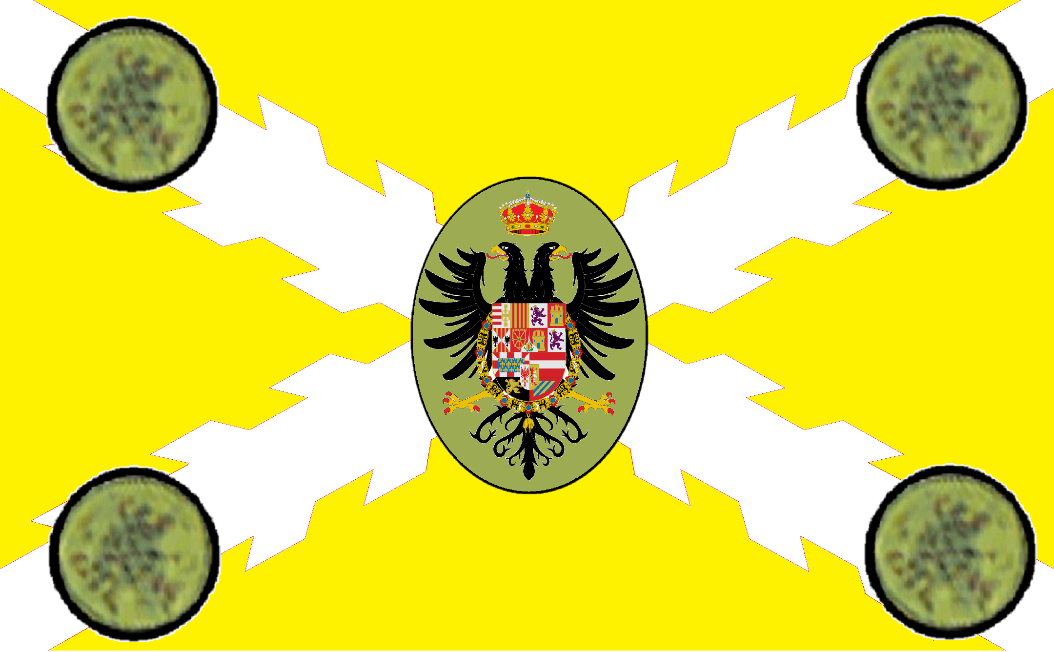 La bandera de la ciudad de Comayagua es de forma rectangular, de color amarillo, simbólico de la iglesia católica; con la cruz de Borgoña o de San Andrés de plata (color blanco), en cada brazo de la cruz un círculo amarillo con las armas de la provincia y en el centro en círculo oval amarillo, el escudo de armas de Carlos V